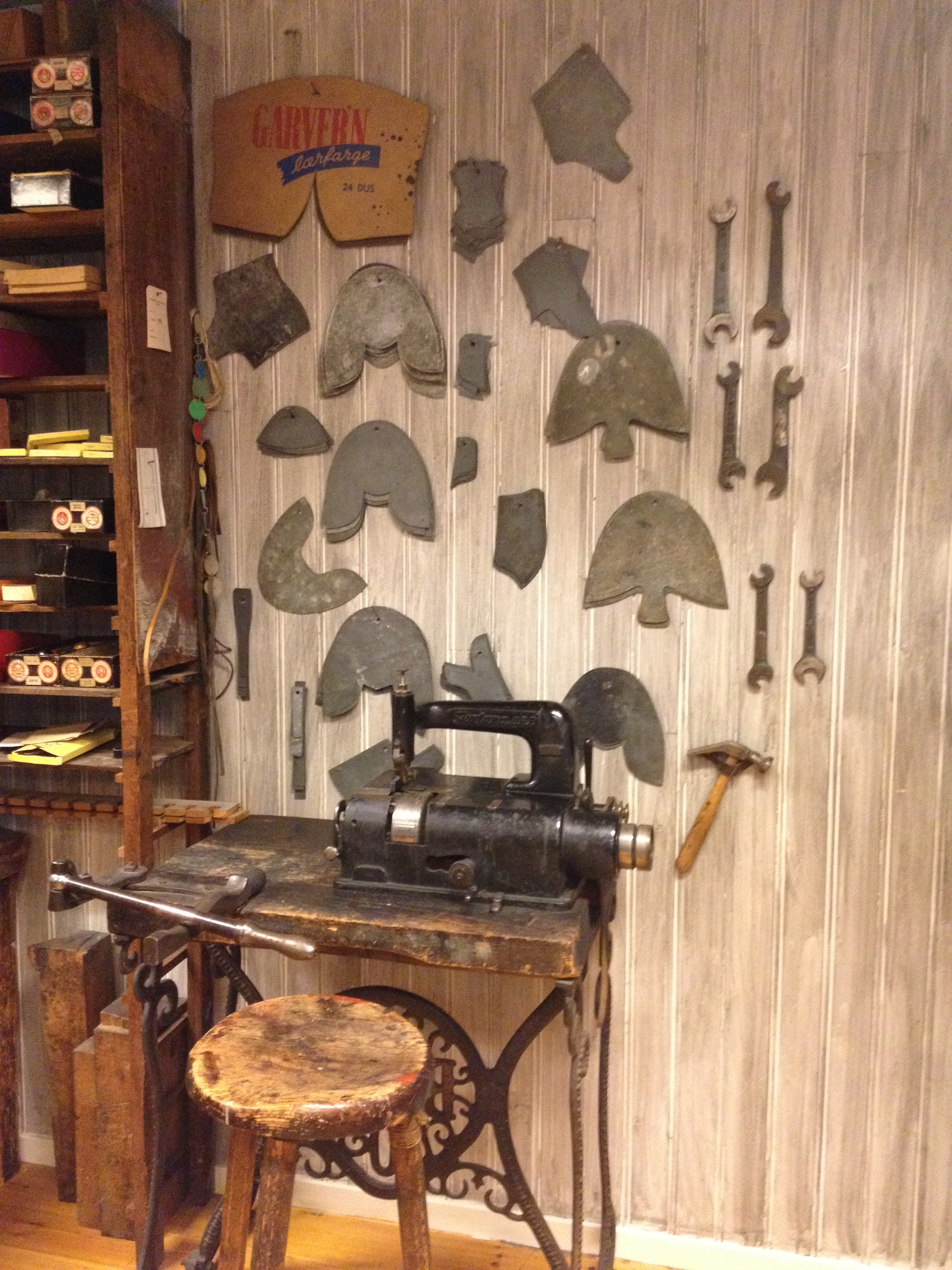 Vagle skofabrikk, Sandnes. Byhistorisk utstilling på Vitenfabrikken januar 2015.